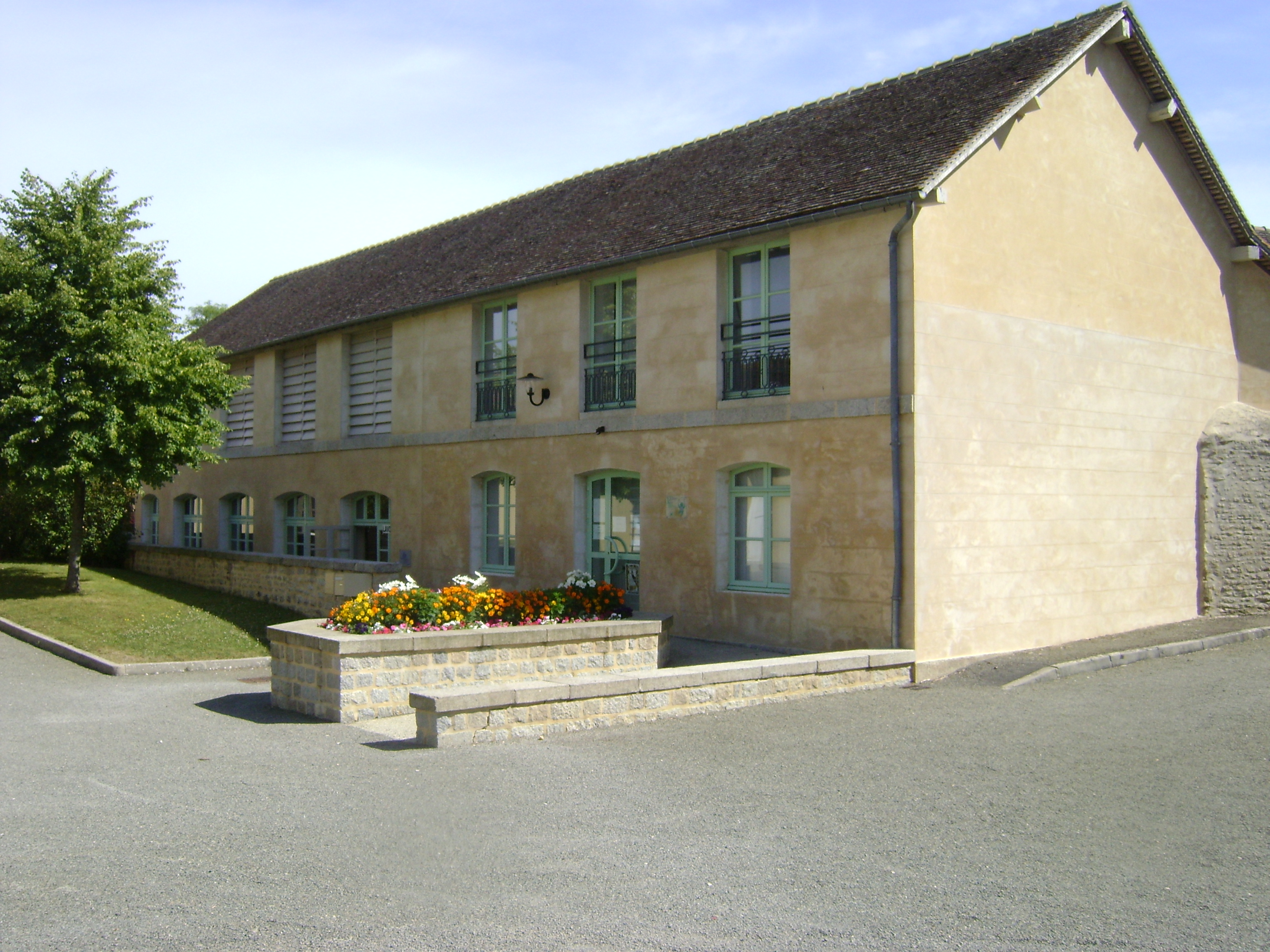 Champfleur (Sarthe) - Lavoir du Couvent des Soeurs Franciscaines (1885).